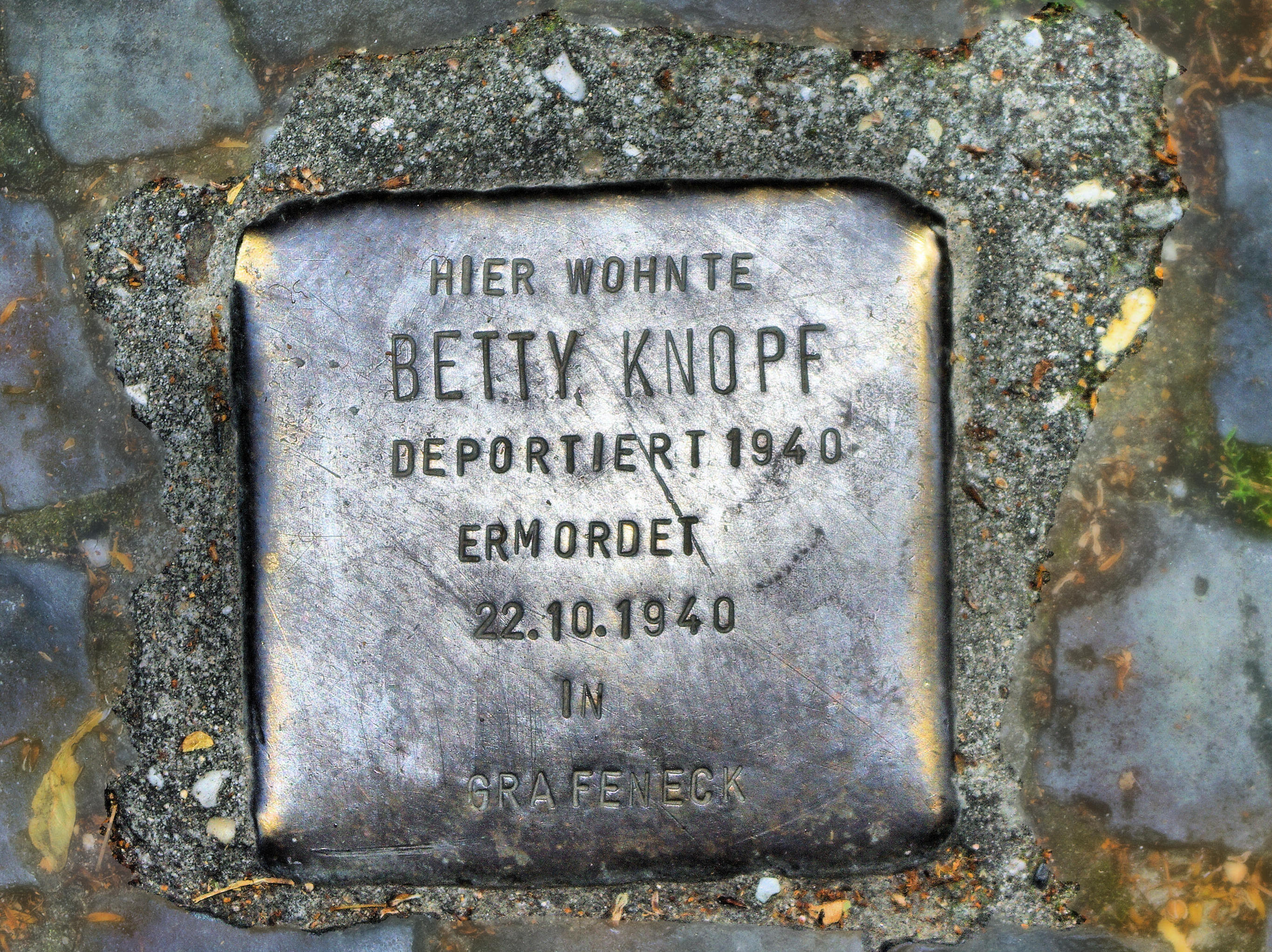 Der vor der linken Torsäule (Haus Knopf (Freiburg) 1.jpg) des Hause Knopf eingelassene Stolperstein. Dieser erinnert an Betty Knopf, die 1940 deportiert und in Tötungsanstalt Schloss Grafeneck ermordet wurde. Nach Auskunft von Bernd Serger liegt der Stolperstein jedoch an der falschen Stelle: Betty Knopf lebte nie in der Beethovenstraße, sondern wohnte vor ihrer Einlieferung in die psych. Klinik in Illenau bei Achern Mitte der 20er Jahre mit ihren Eltern, zuletzt mit der Mutter Rebekka Knopf im Haus Ludwigstraße 30 in Freiburg, das beim Luftangriff im November 1944 vollkommen zerstört wurde.